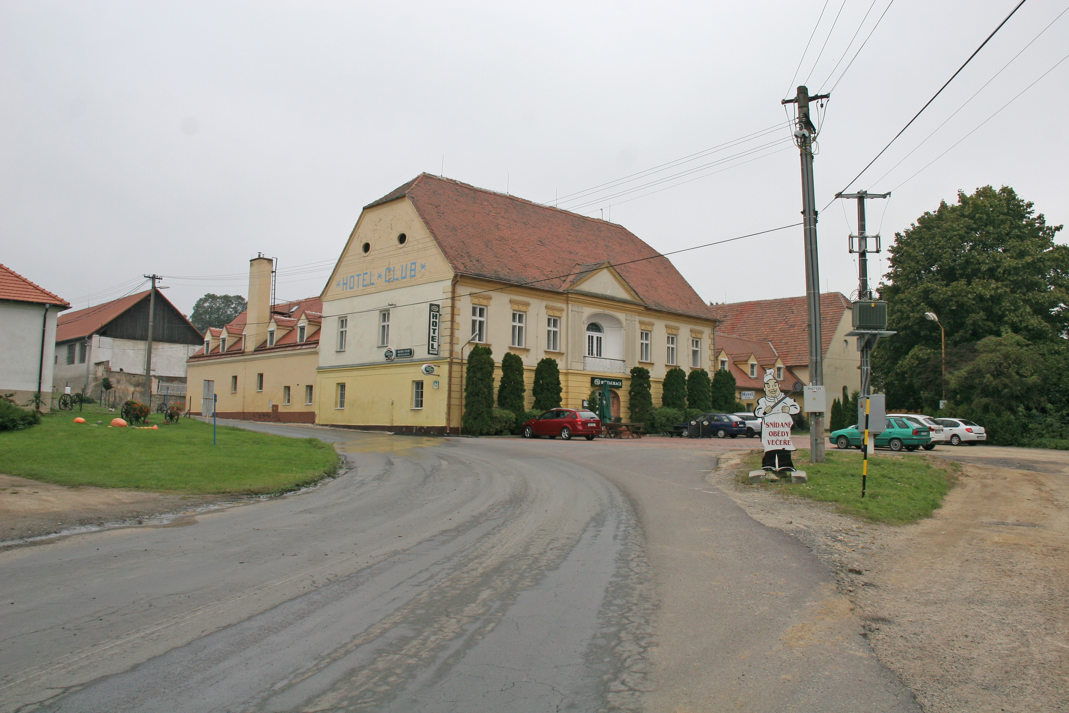 Jiná obytná stavba, naproti kapli, Vranovská Ves.